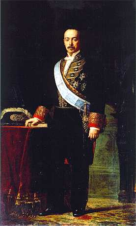 Retrato de Manuel García Barzanallana, primer marqués de Barzanallana. Nació y murió en Madrid (1817-1892). Ocupó la cartera de Hacienda en 1856-1857, 1864-1865 y 1866-1868 bajo la presidencia del general Narváez. Durante la Restauración, fue Presidente del Consejo de Estado y del Senado (1876-1881). También fue presidente de la Real Academia de Ciencias Morales y Políticas. El retratado aparece de pie, con uniforme de ministro y espadín, luce en el pecho varias placas y bandas, entre ellas las de las Ordenes de Carlos III y de Isabel la Católica. Sobre la mesa descansan el bicornio y dos libros, apoyando la mano derecha sobre uno de ellos. El escenario es un interior de salón con una chimenea encendida y un cortinaje. La disposición de la figura y el detenido tratamiento de los detalles de la vestimenta revelan la influencia recibida del pintor Federico de Madrazo, influjo que Dionisio Fierros reflejó muy especialmente en la hechura de retratos, campo en el que llegó a conseguir cierto prestigio en los ambientes madrileños.